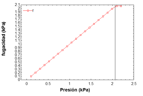 Fugacidad del agua a 18 °C para un intervalo de presiones desde 0 a 2.5 kPa en el software EES.